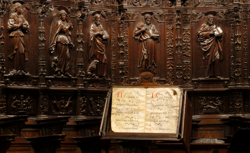 detalle silleria catedral Pamplona